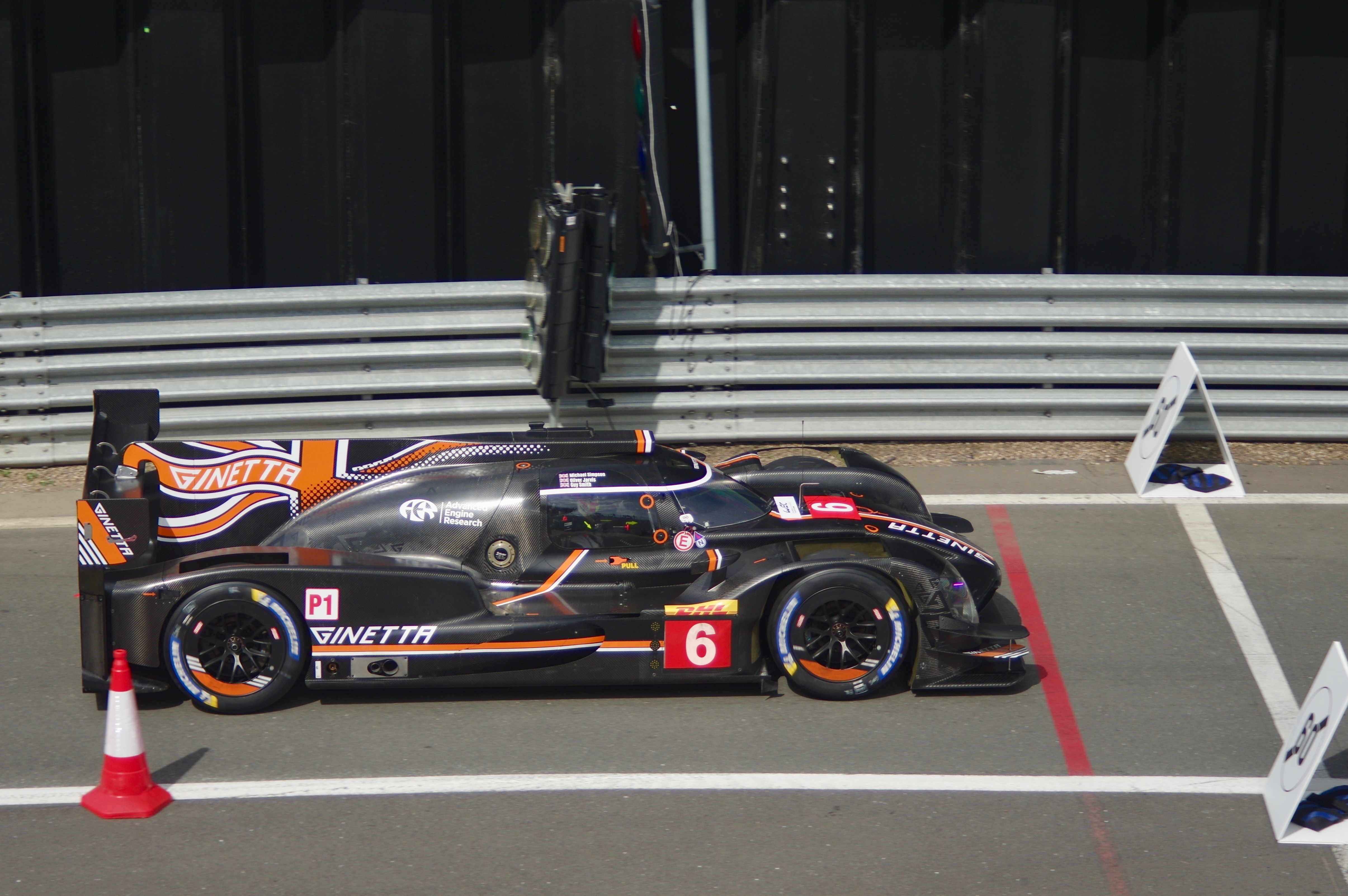 No. 6 Ginetta G60-LT-P1 from Team LNT at the 4 Hours of Silverstone during the World Endurance Championship Season 2019/20.